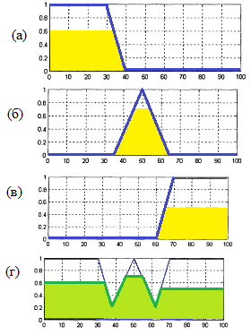 Приклад акумуляції висновка для вихідної лінгвістичної змінної «швидкість руху автомобіля»